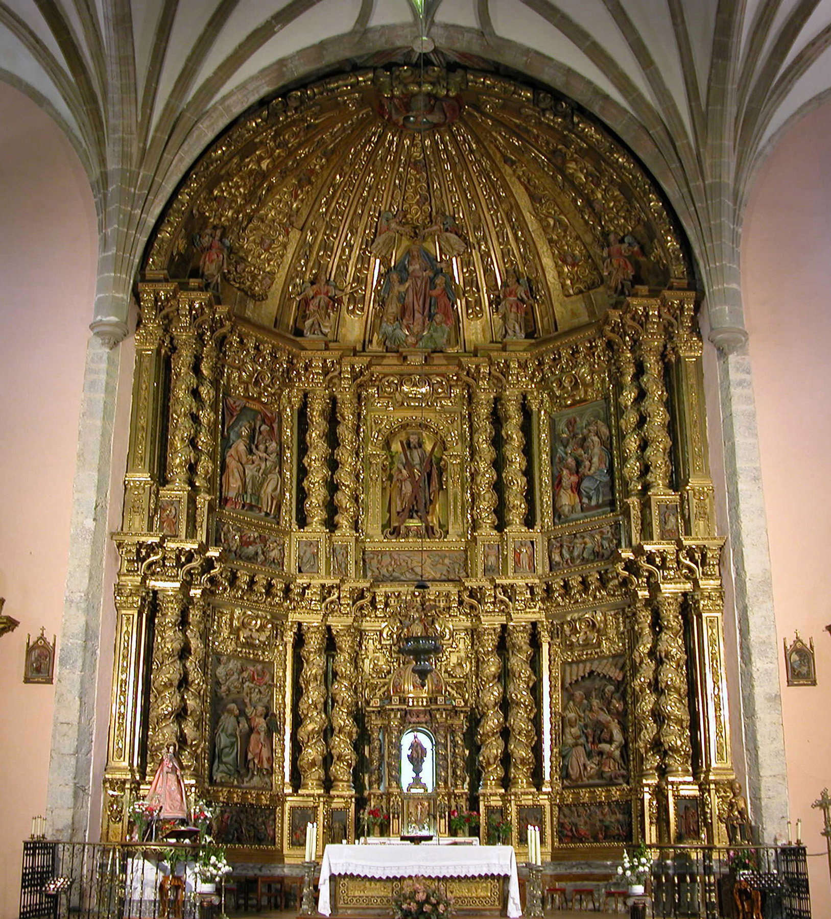 ANGUIANO-Retablo de la Iglesia de San Andrés. Realizado entre 1672 y 1686.